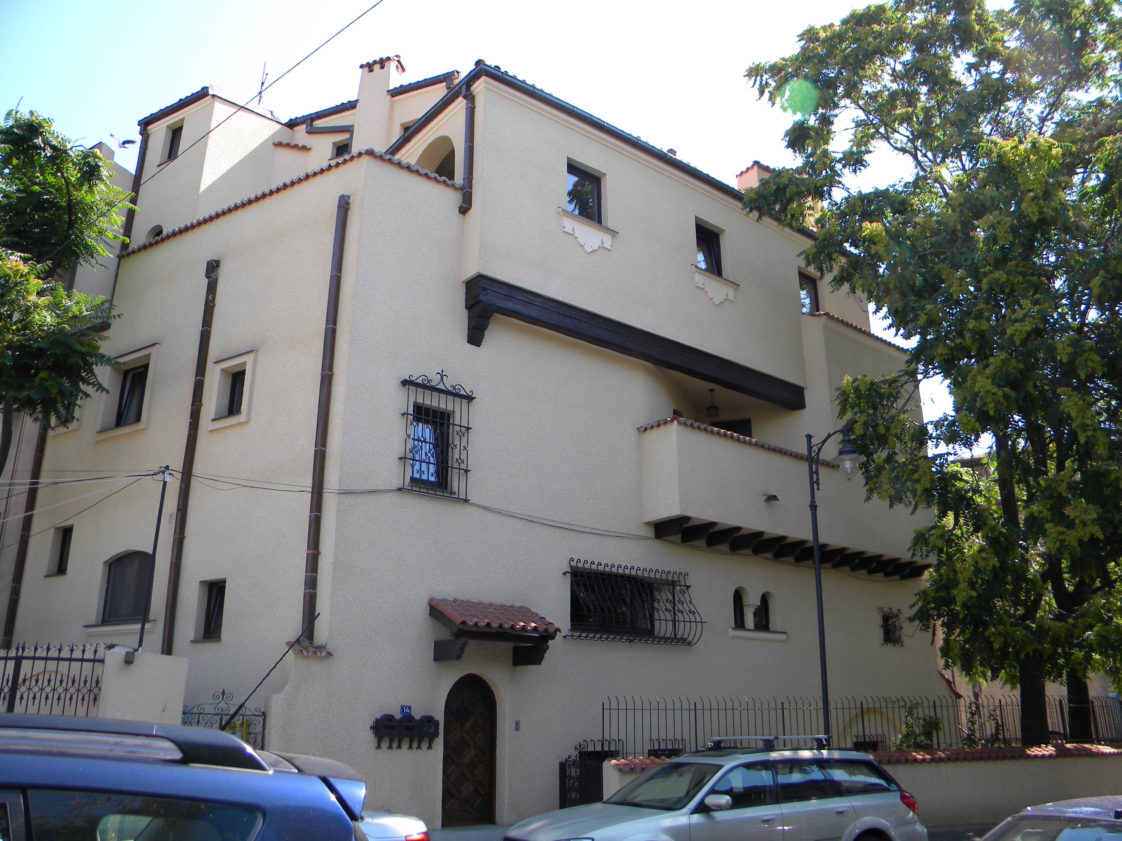 Bucuresti, Romania, Casa pe Str. Eremia Grigorescu nr. 14; B-II-m-B-18833